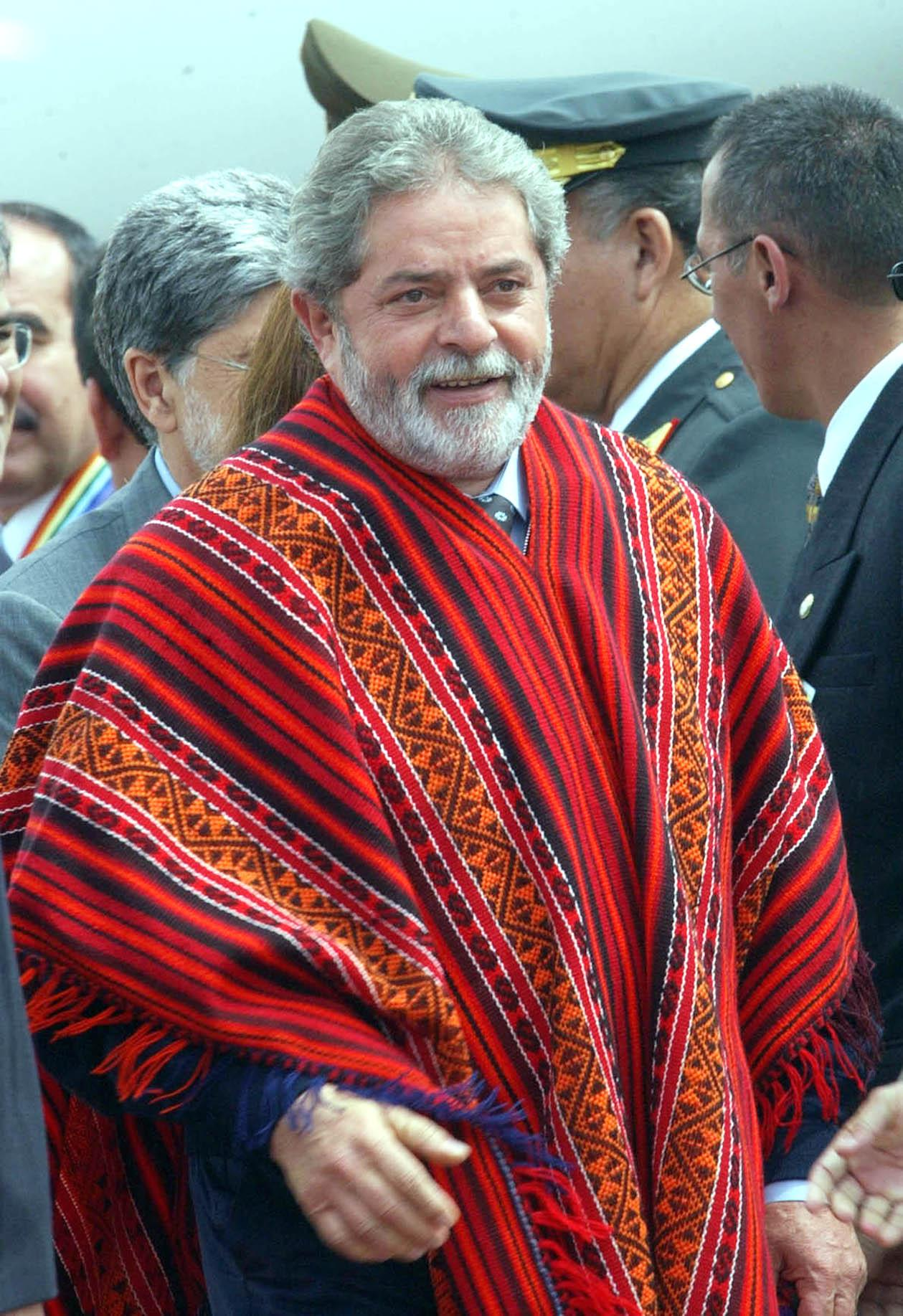 O presidente brasileiro Luís Inácio Lula da Silva vestindo um poncho.